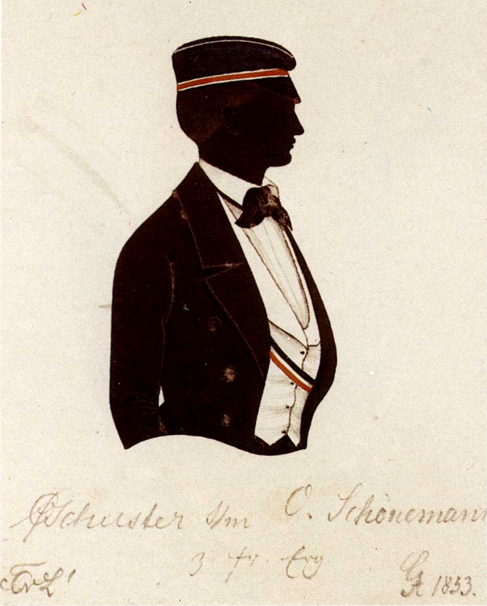 Friedrich C Schuster Landsmannschaft Luneburgia Göttingen